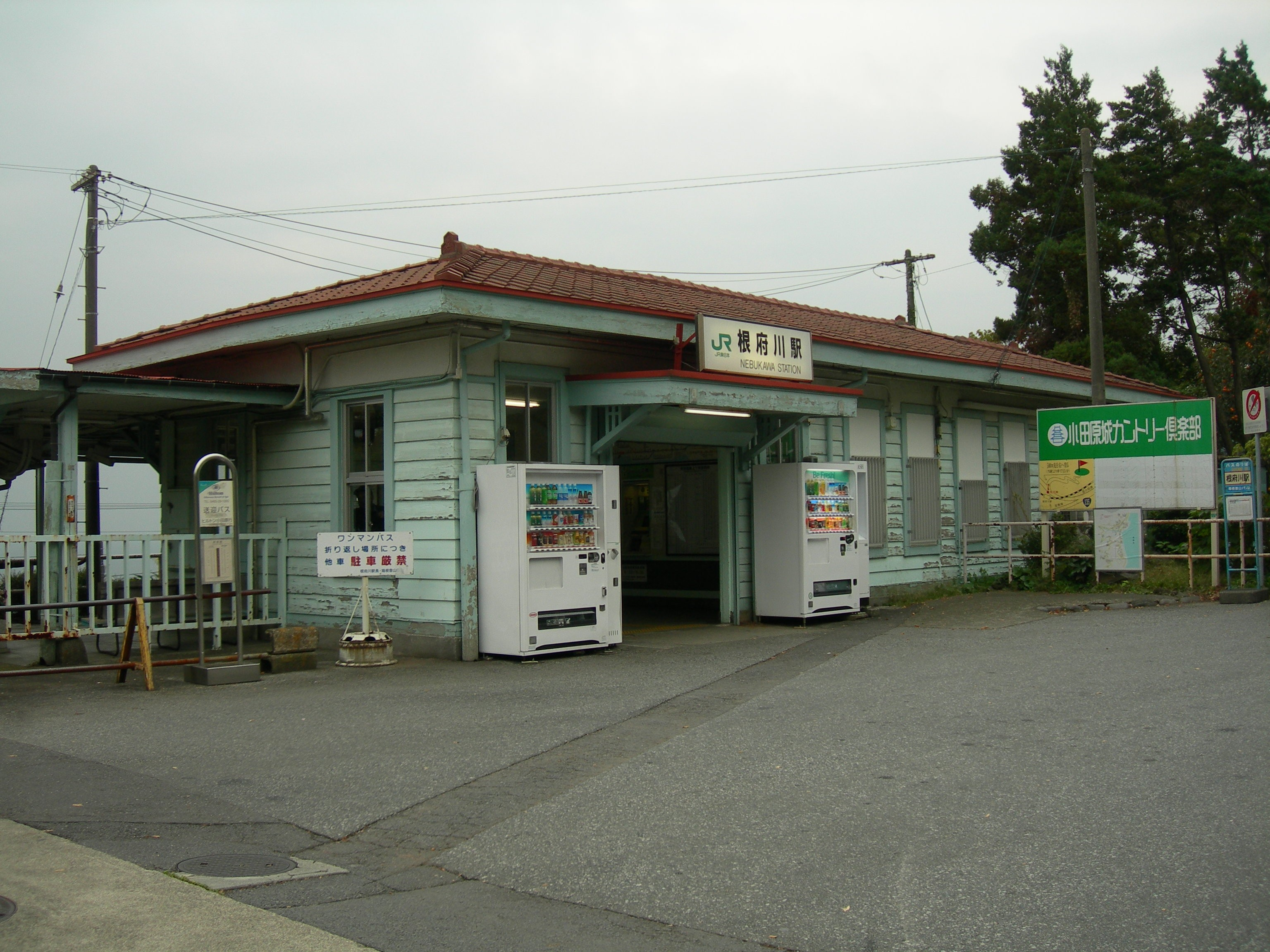 根府川駅